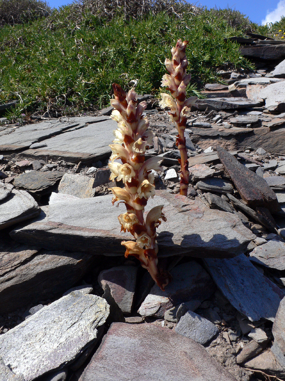 Orobanche latisquama en el Parque Natural de Calblanque (Cartagena). Al fondo romero, planta a la que parasita.